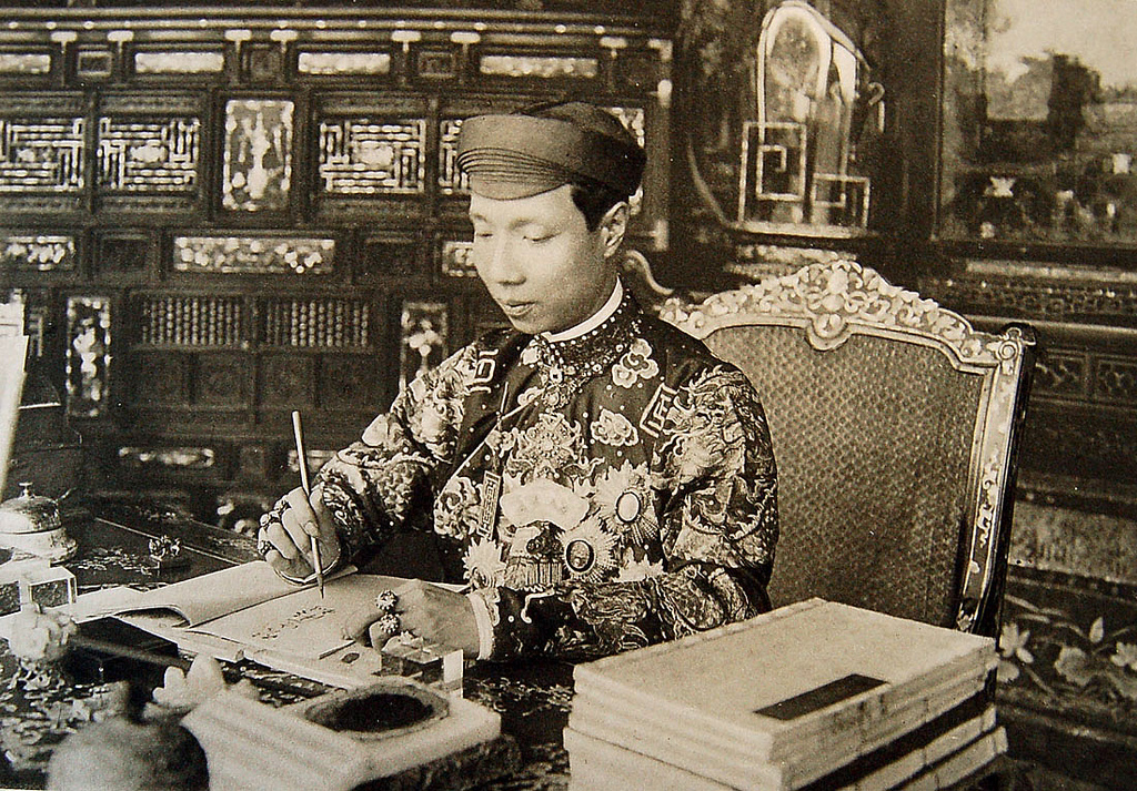 Emperor Khai Dinh Jan 1916